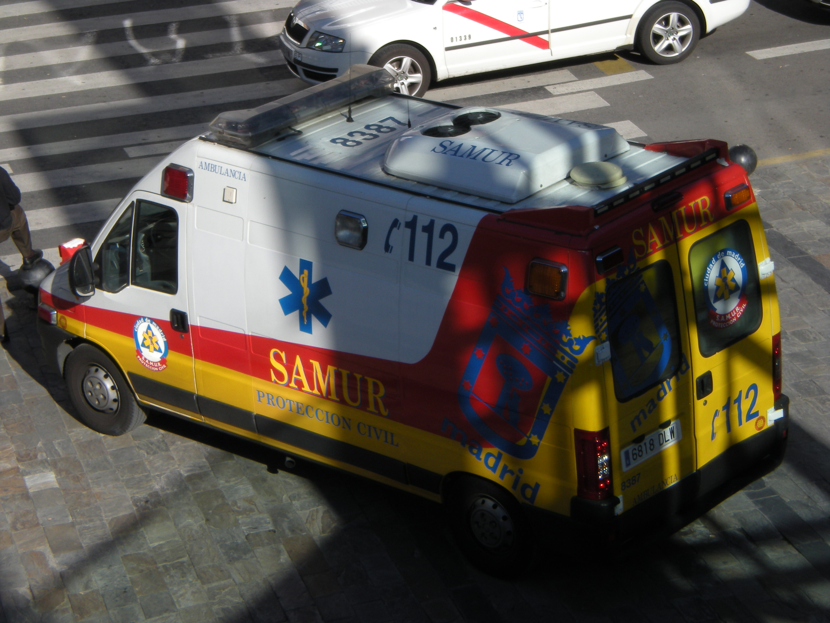 Ambulancia del SAMUR, Madrid, España